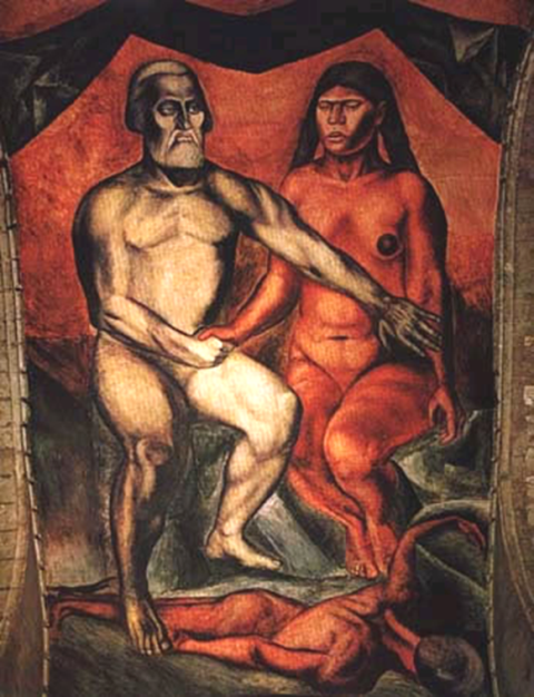 Foto 60 del libro / Fresco "Cortes y la Malinche" (1926) de José Clemente Orozco, localización: Colegio San Ildefonso. México